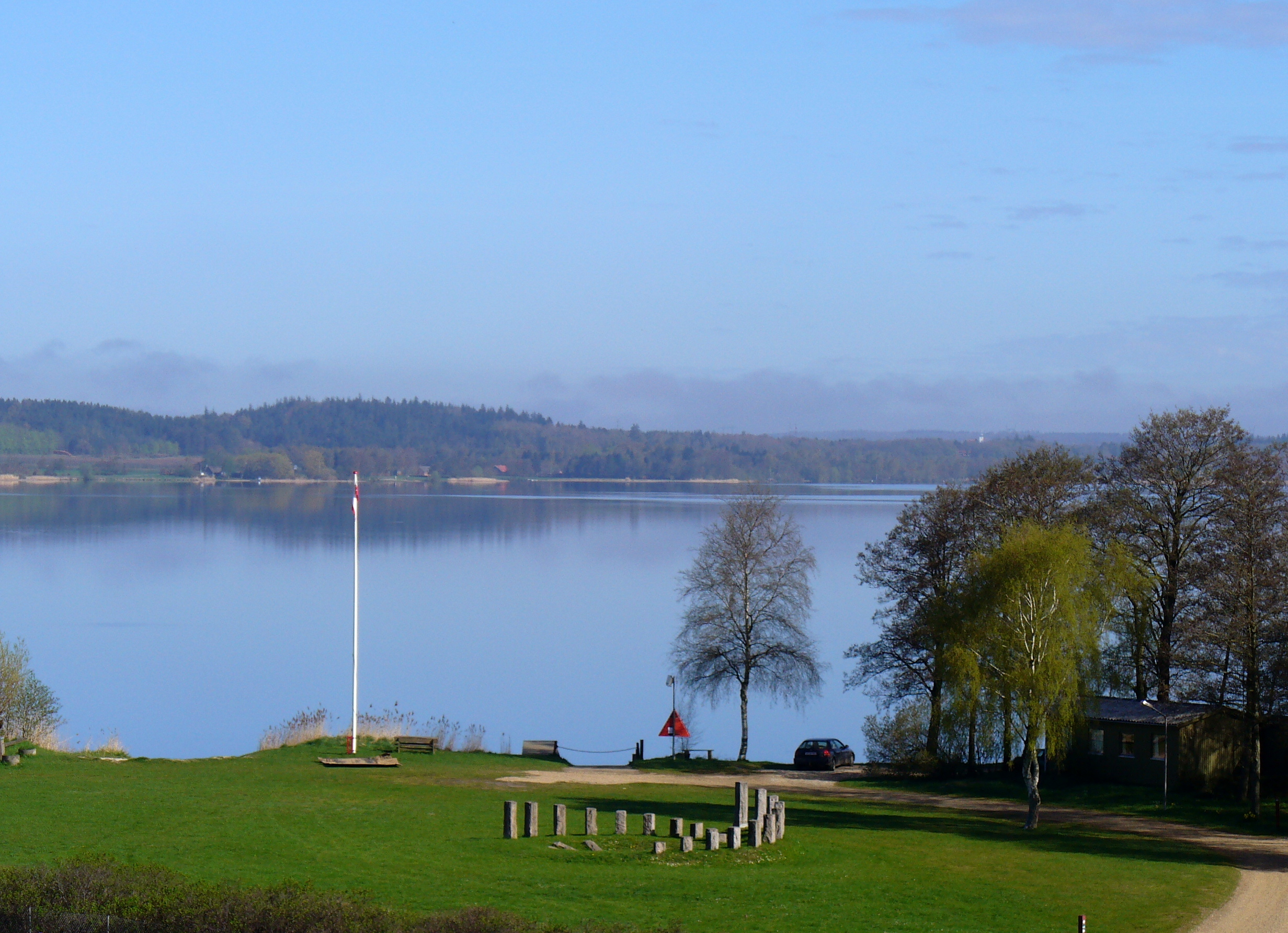 Tange Sø fra Søbredden ved Ans.